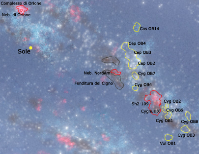 Dettaglio del Braccio di Orione